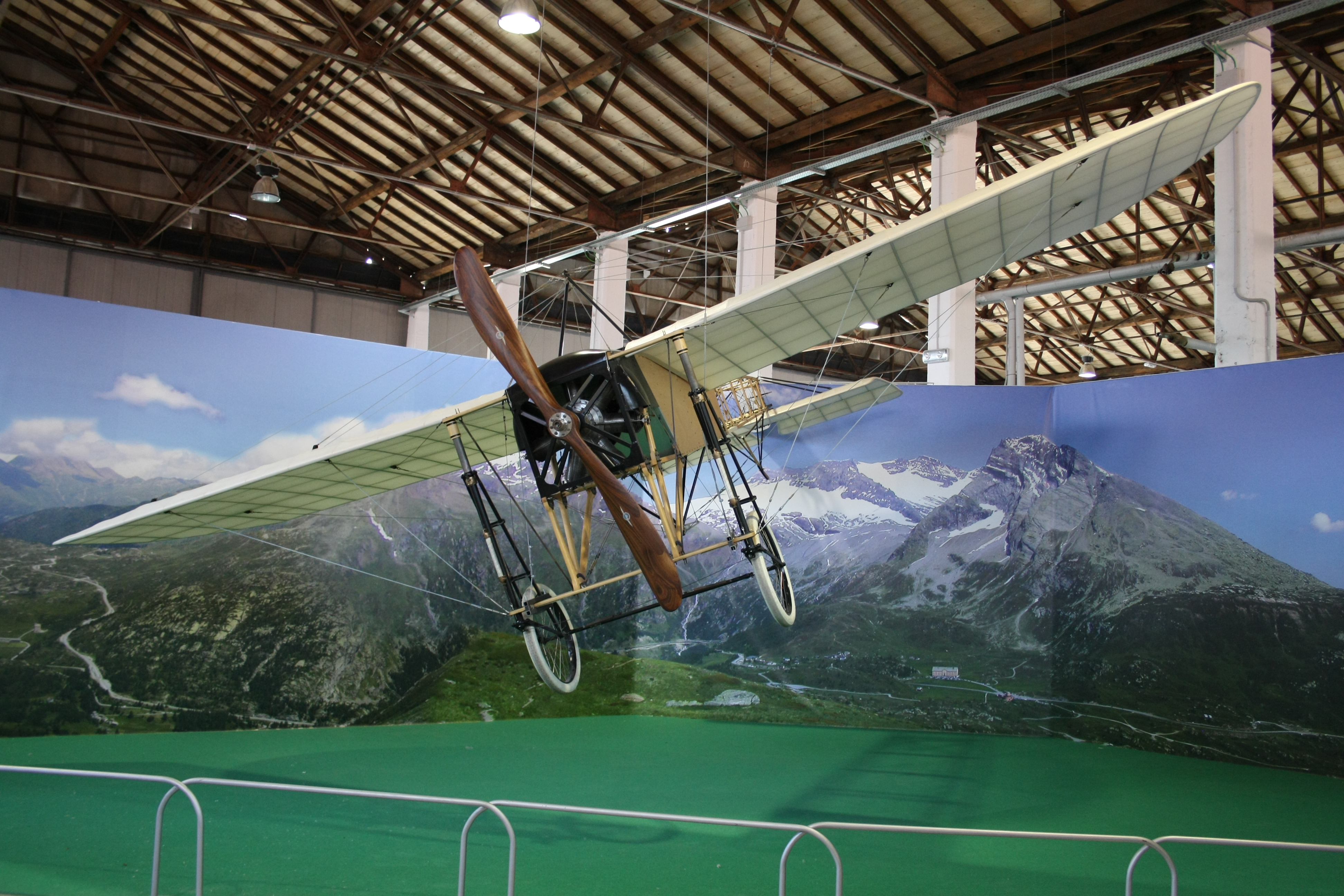 Blériot XI conservato presso il museo del volo "Volandia".